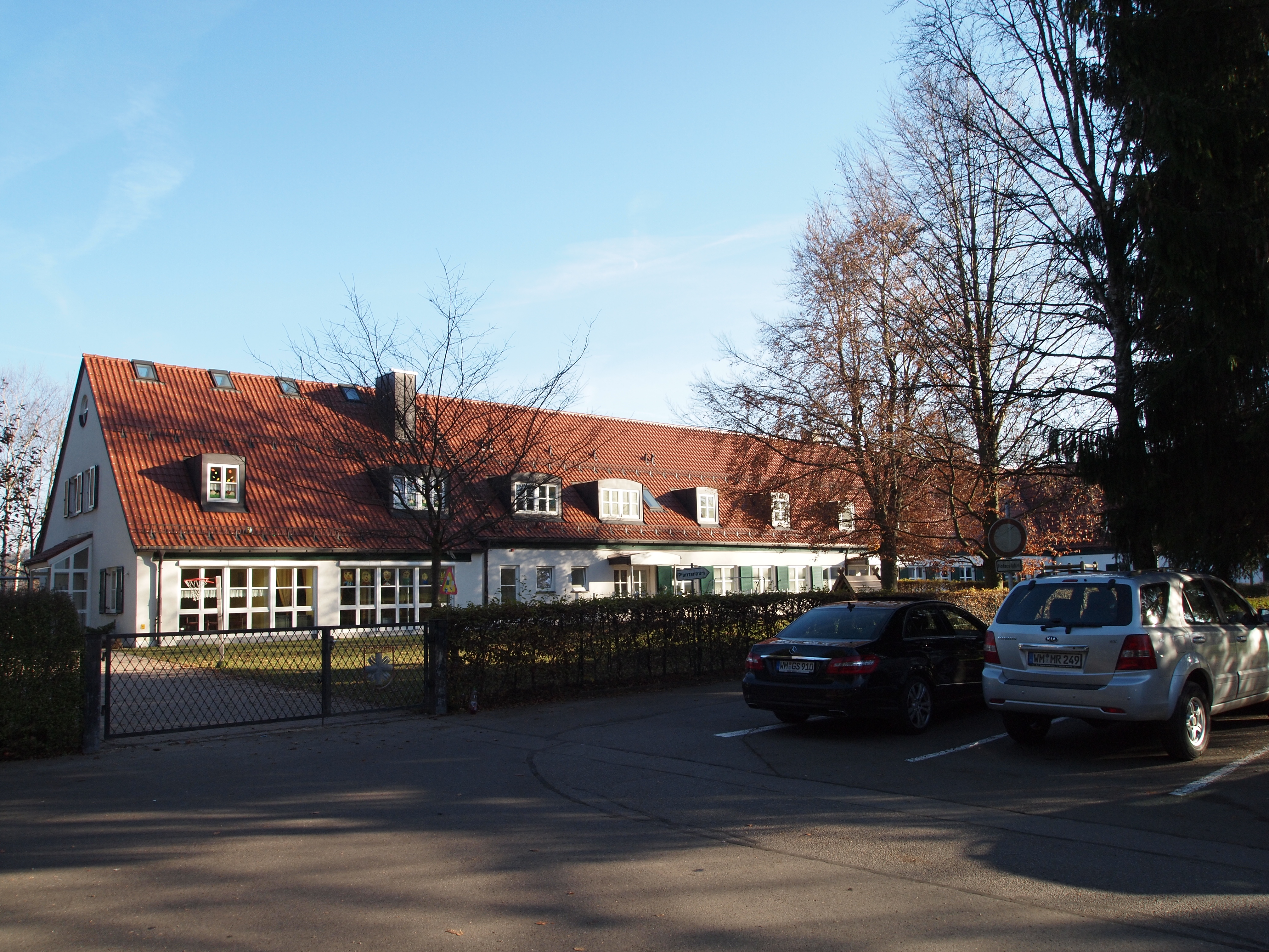 Ehemaliges Offizierscasino des Fliegerhorst Schongau, heute Kindergarten St. Johannes an der Schönlinder Straße